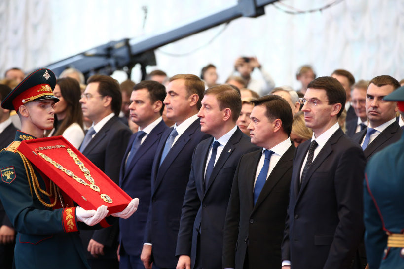 Андрей Воробьев вступил в должность губернатора Московской области